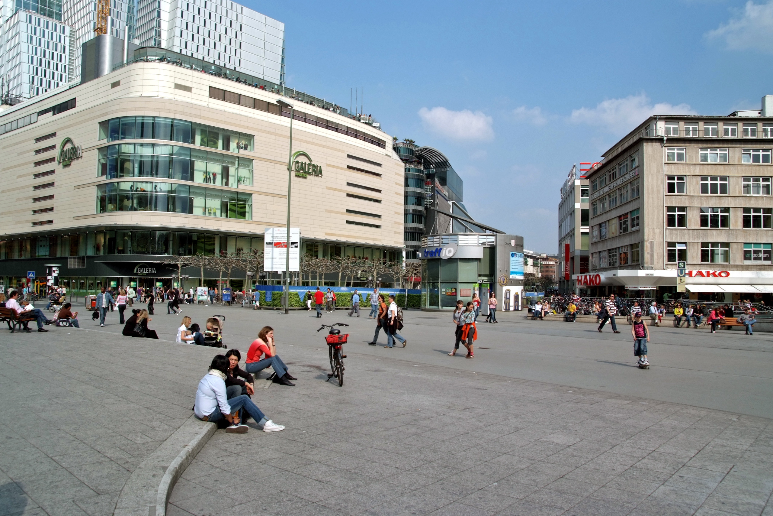 Hauptwache: Kaufhof, Verkehrsinsel, Zeil